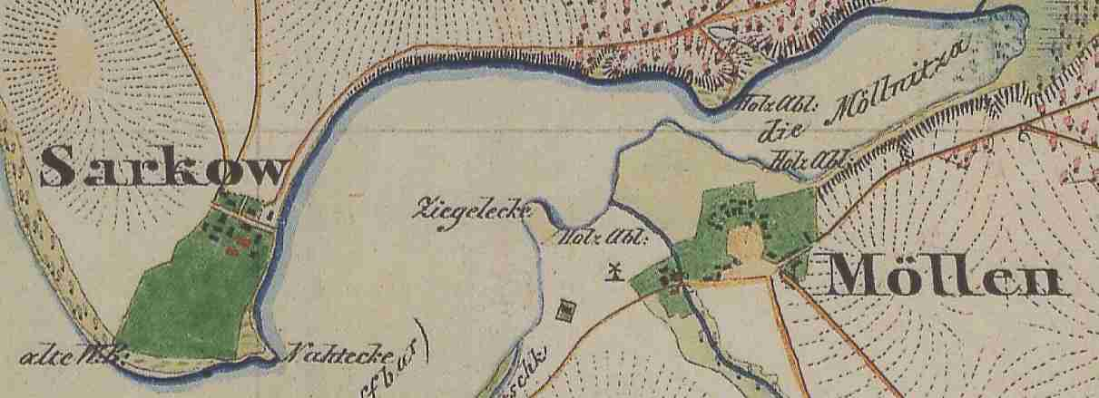 Möllen, Ortsteil der Gemeinde Friedland (Niederlausitz) und Sarkow, Wohnplatz der Gemeinde Friedland (Niederlausitz), Lkr. Oder-Spree, Brandenburg, Deutschland. Ausschnitt aus dem Urmesstischblattes 3951 Trebatsch von 1849